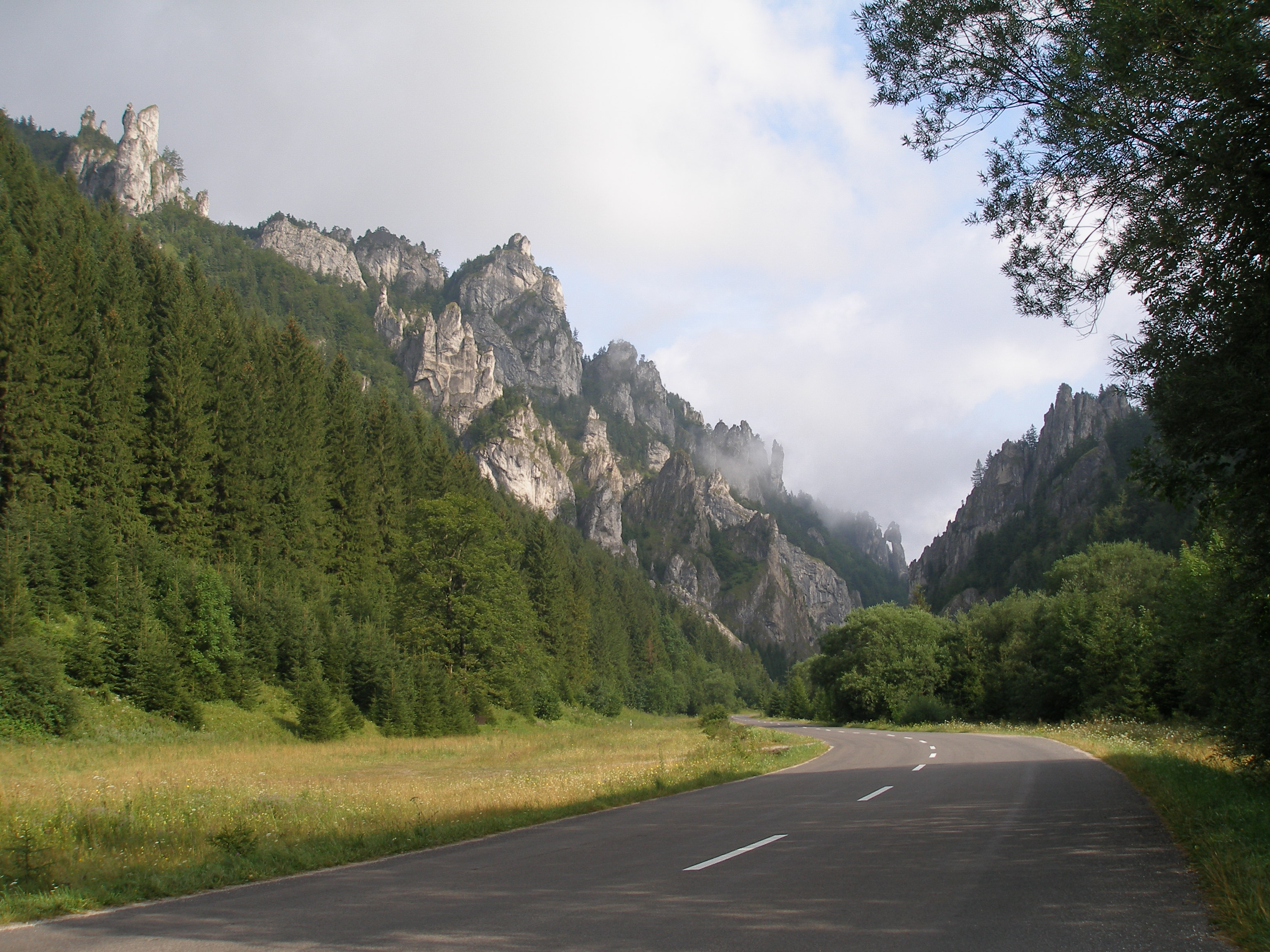 Vrátna dolina v pohorí Malej Fatry, skalná súteska